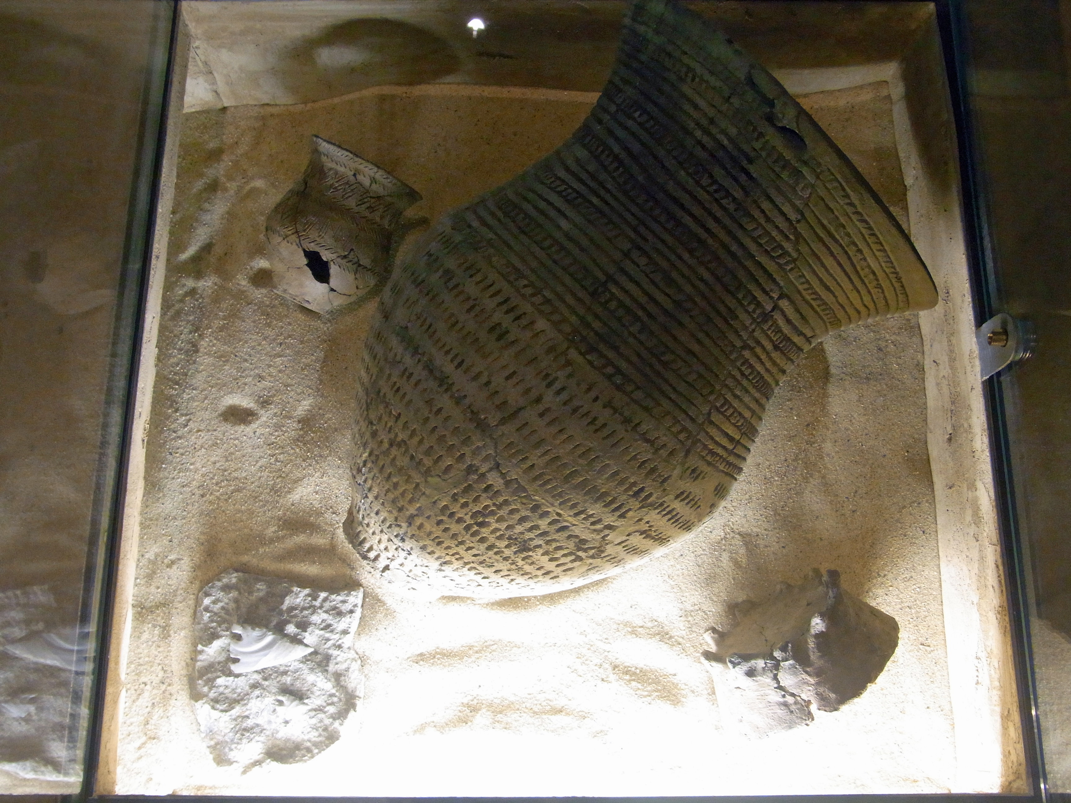 LWL-Museum für Archäologie Funde aus Siedlungen: zwischen 2800 - 1500 Chr.; Fundorte: kleiner Becher und Schale mit Füßchen aus Olfen; „Pavenstädter Riesenbecher“ aus Gütersloh-Pavenstädt; große Pfeilspitze aus Lotte-Wersen und kleine Pfeilspitze aus Borgholzhausen